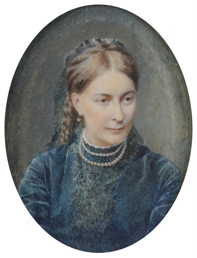 Княгиня Софья Александровна Щербатова, ур. Апраксина (1852—1919), дочь капитан-лейтенанта графа Александра Александровича Апраксина и Софьи Васильевны Ладомирской; c 1884 года жена князя Н. С. Щербатова.